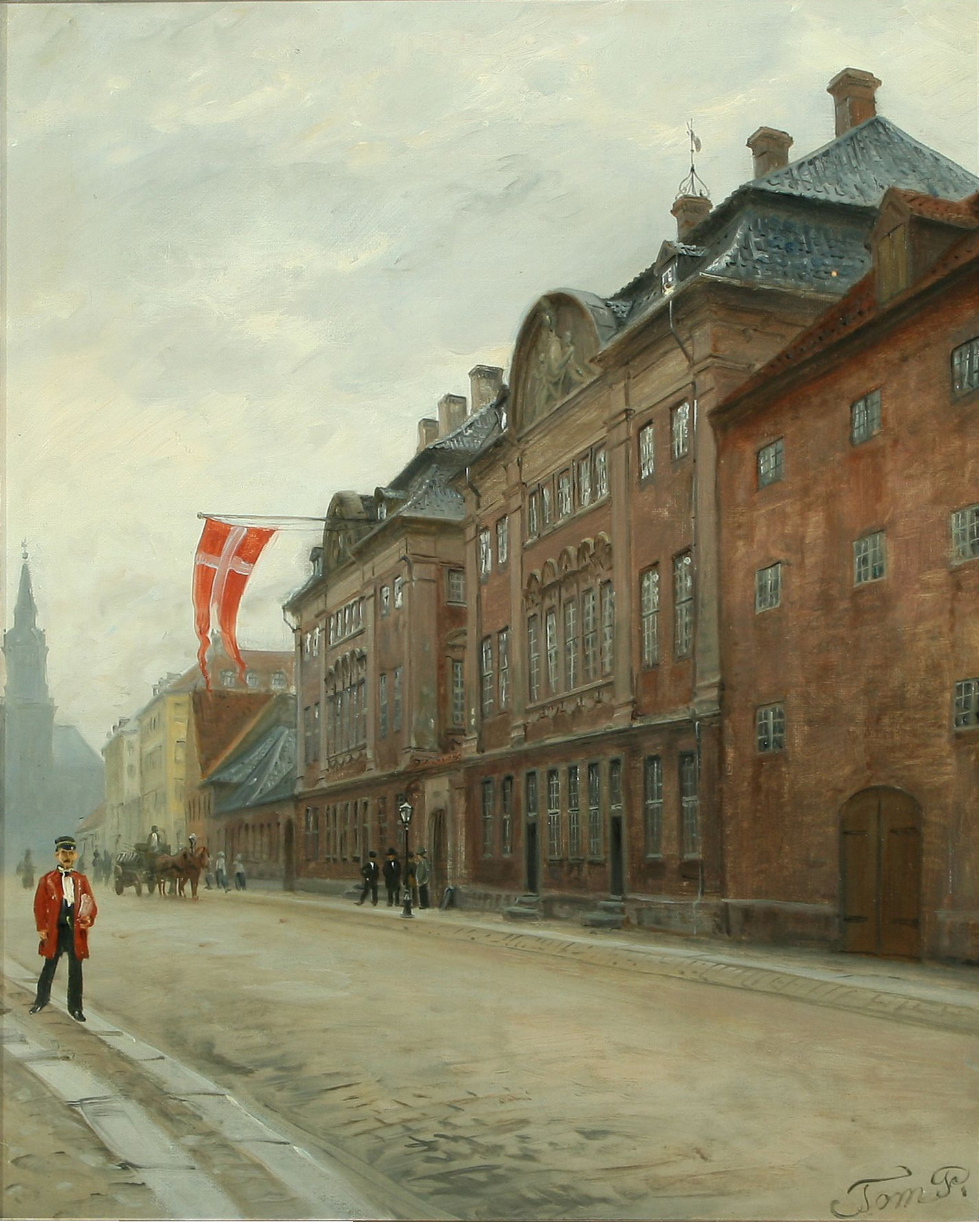 Peter Tom-Petersen (1861-1926) Asiatisk Kompagnis bygning formodentlig omkring 1888 Olie på lærred. 42 x 35. Privat eje